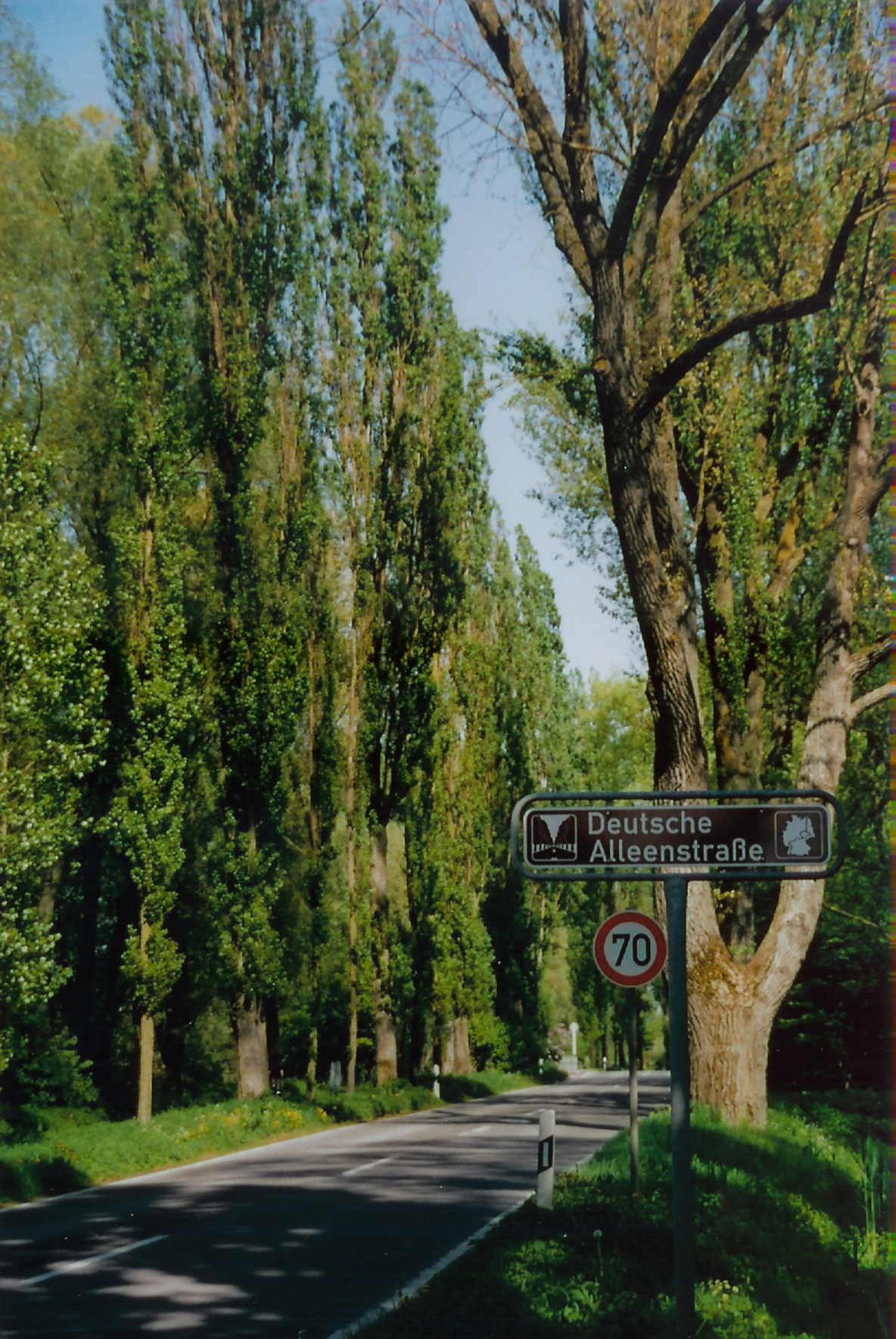 Endpunkt der Deutschen Alleenstraße auf der Insel Reichenau, Bodensee, Baden-Württemberg, Deutschland.